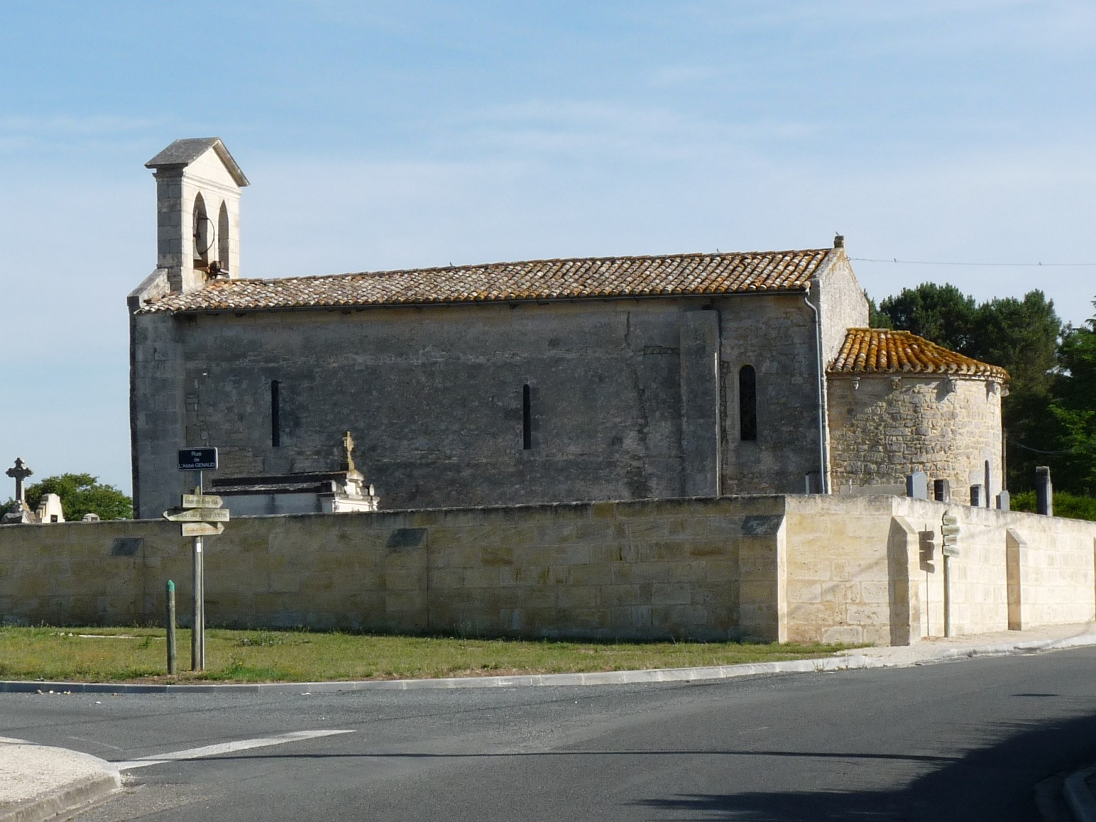 Eglise de Camps-sur-l'Isle, Gironde, France